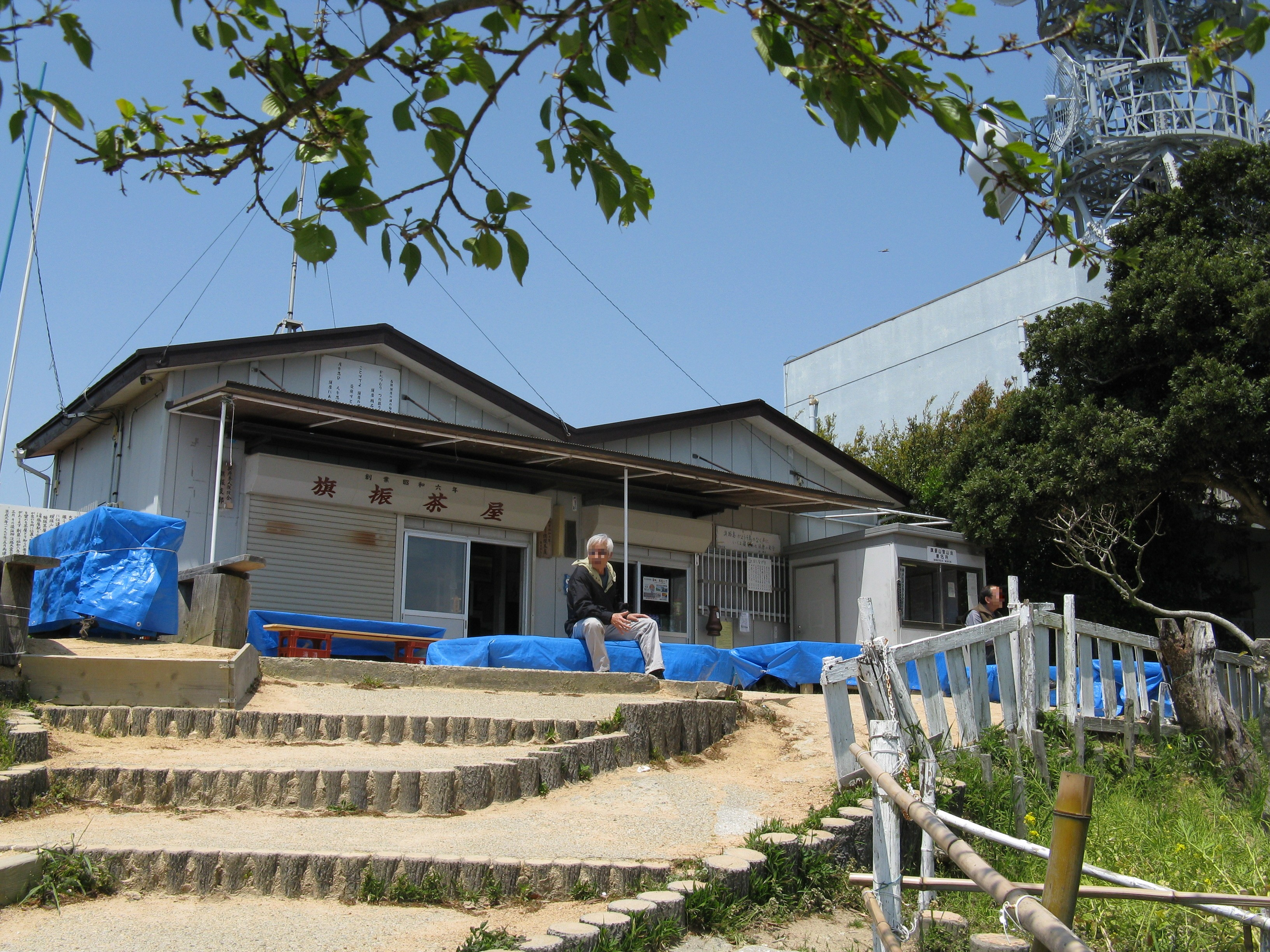 旗振山 山頂